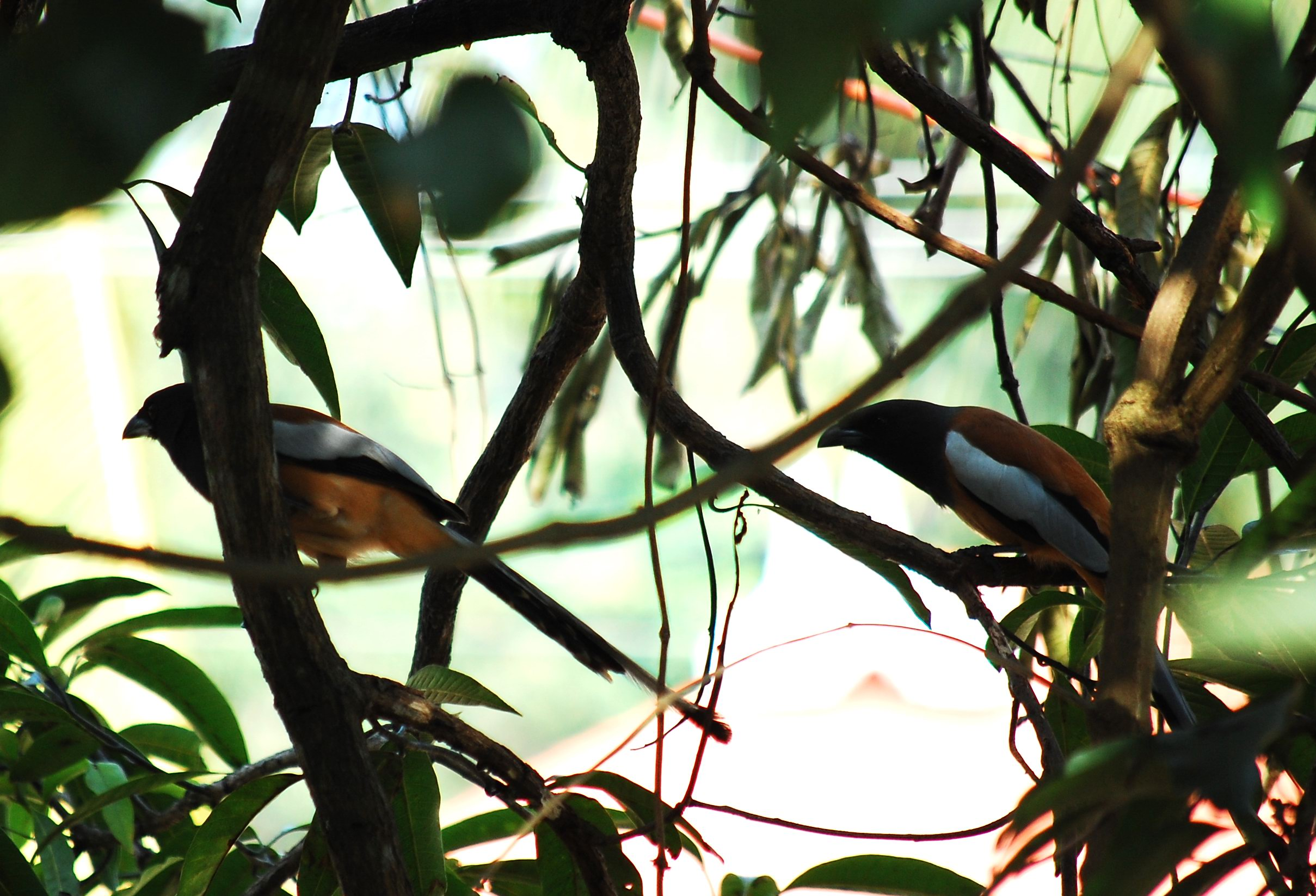 ഓലേഞ്ഞാലികൾ